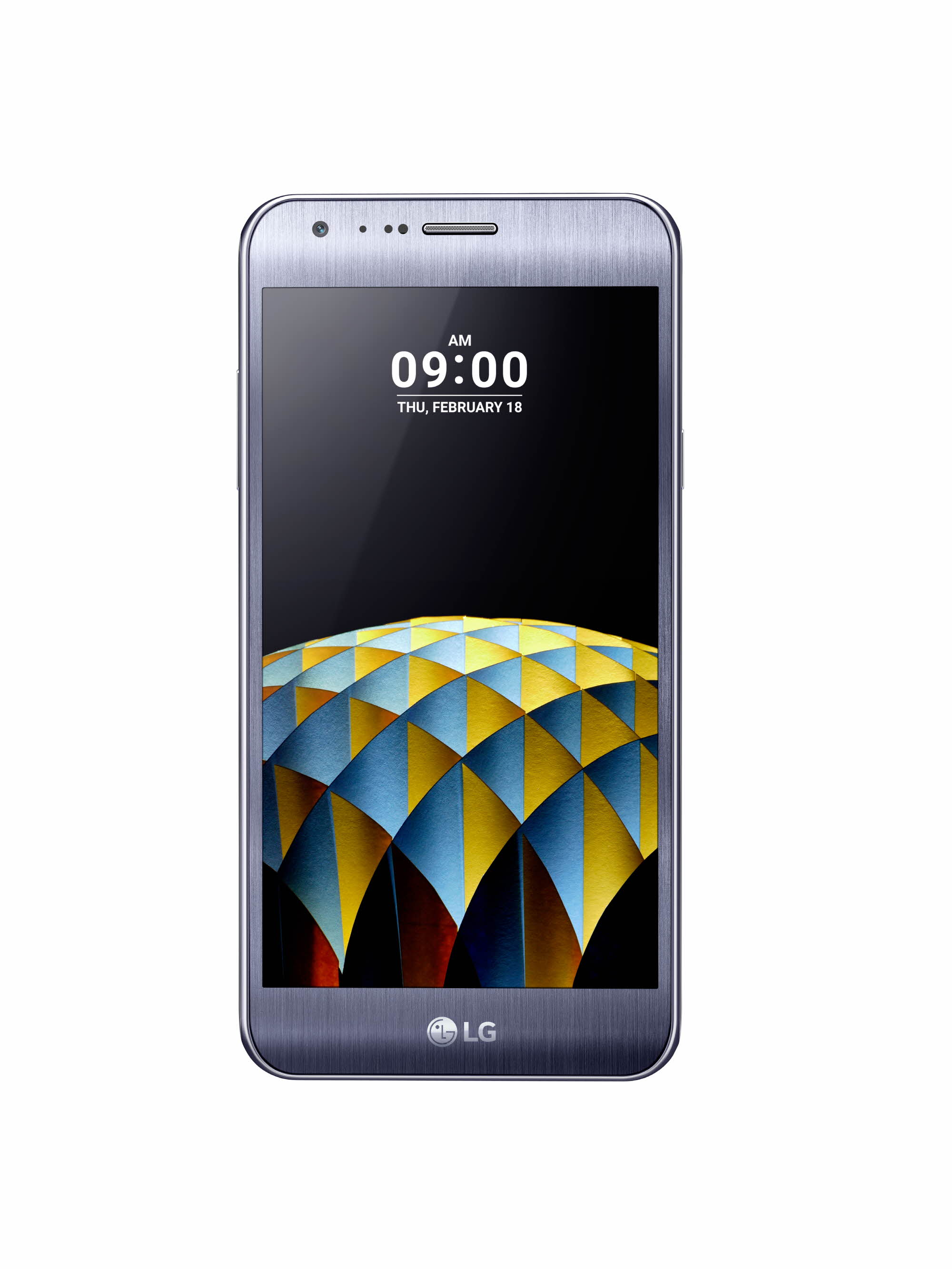 LG전자, 보급형 스마트폰 ‘X 시리즈’ 'MWC 2016'서 공개 ■ ‘듀얼 카메라’ 탑재한 ‘X 캠’, ‘세컨드 스크린’ 채택한 ‘X 스크린’ 등 2종 선보여 ■ 프리미엄 기능 갖춘 하드웨어 적용해 프리미엄급 사용자 경험 제공 ■ 앞서 출시한 ‘K 시리즈’와 함께 중저가 스마트폰 시장 적극 공략 ※ Social LG전자 ( 에서 관련 보도자료를 확인하실 수 있습니다.